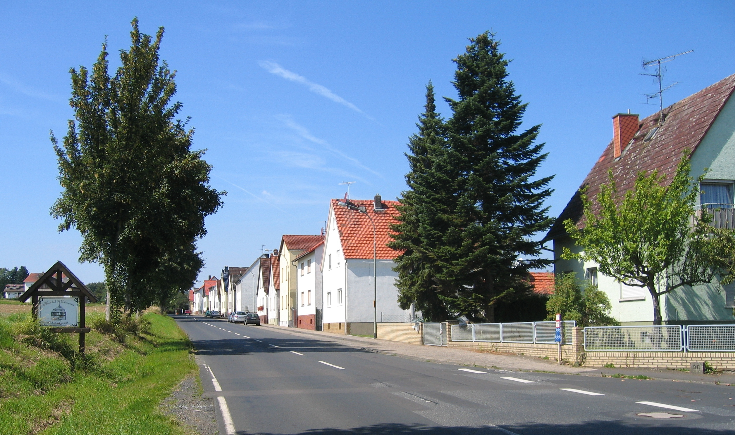 Blick in die Berstädter Straße in Wohnbach. Blickrichtung: Westen